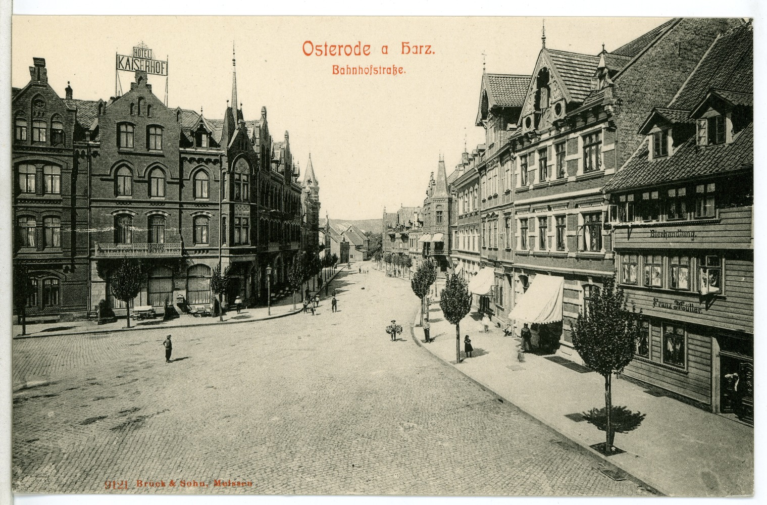 Osterode/Harz; Bahnhofstraße This postcard is from publisher Brück & Sohn in Meißen ( postcard has a unique number 09258 and is available in a higher resolution at the publisher. This images was uploaded in a cooperation project between Wikipedians and the publisher.